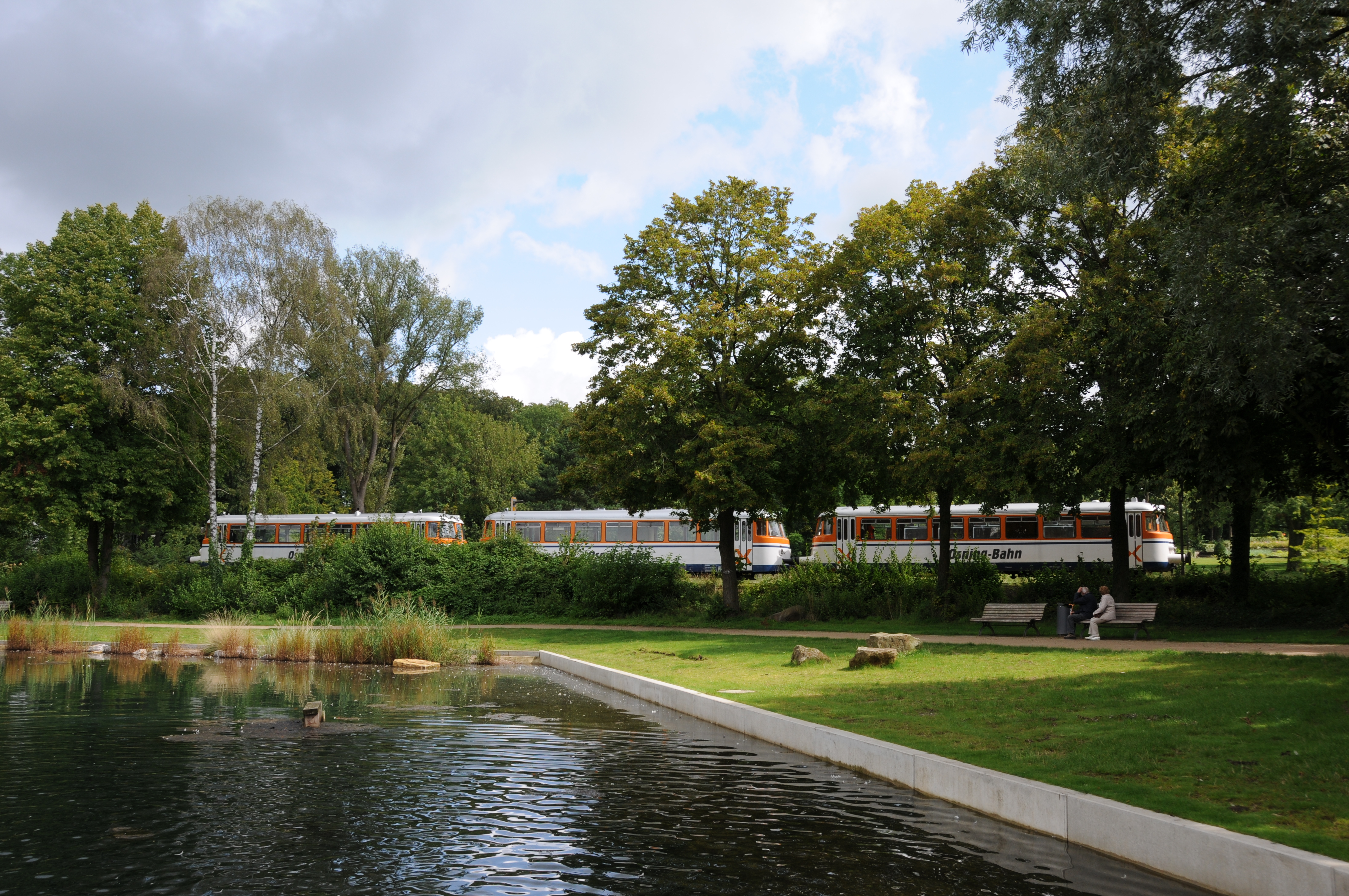 Der dreiteilige MAN-Schienenbus der Osning-Bahn passiert auf dem Bahndamm im Kurpark von Bad Laer den Glockensee.